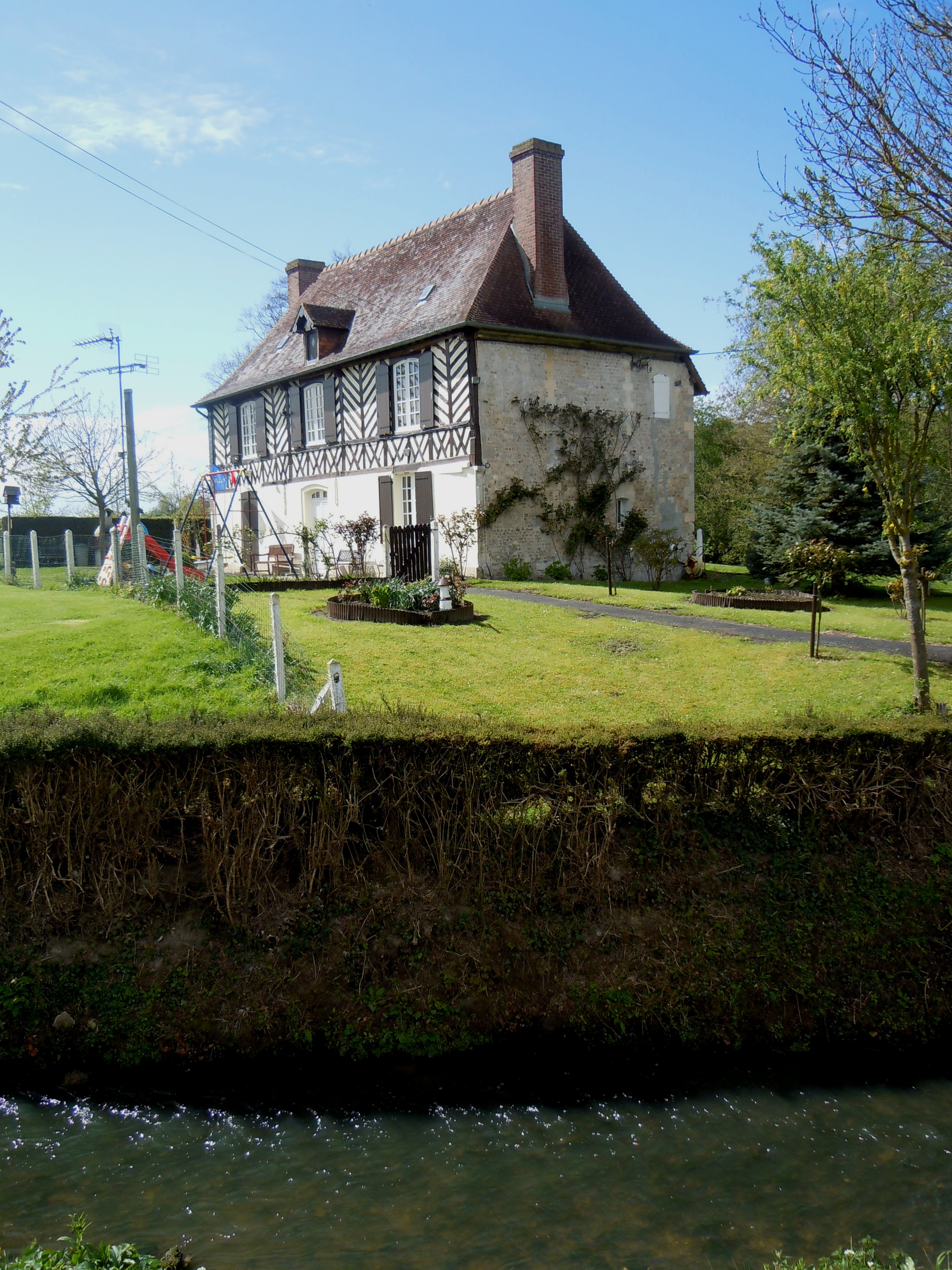 Angerville - Mairie au bord de l'Ancre - Calvados